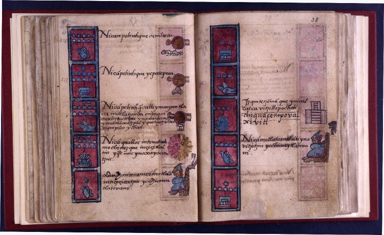 Folio 38 del Codice Aubin. Contiene informacion sobre eclipse.